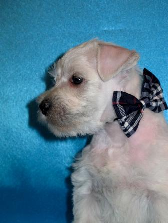 Цвергшнауцер белый Питомник "Ассон Ари" 14